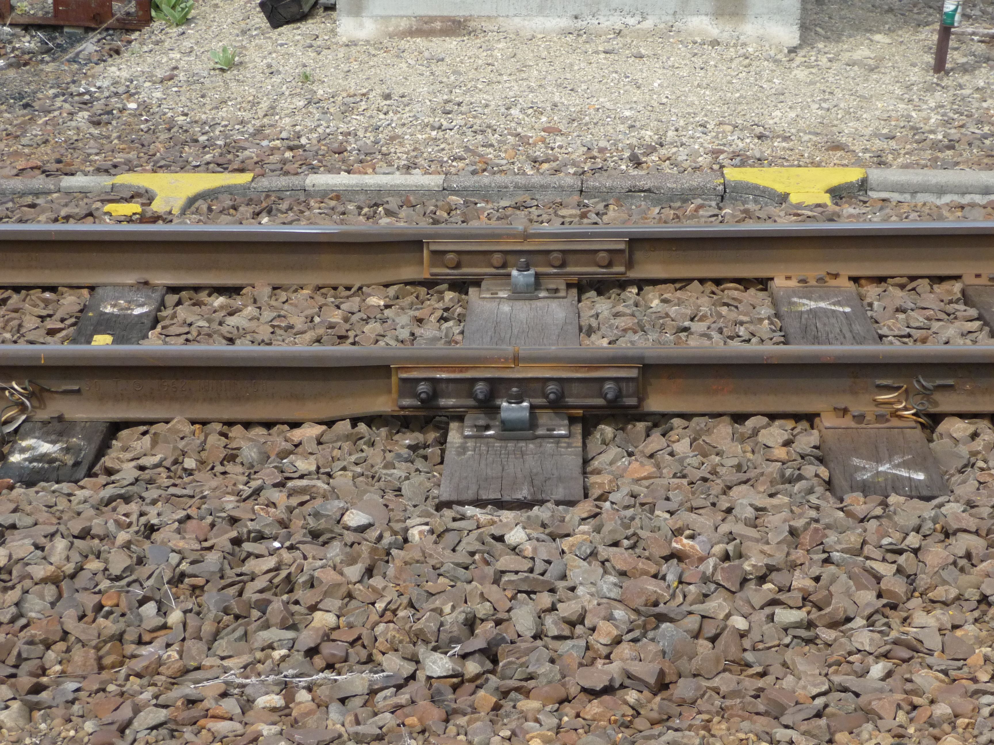 摩周駅構内網走方にある、50T‐50N中継レールと絶縁継ぎ目。